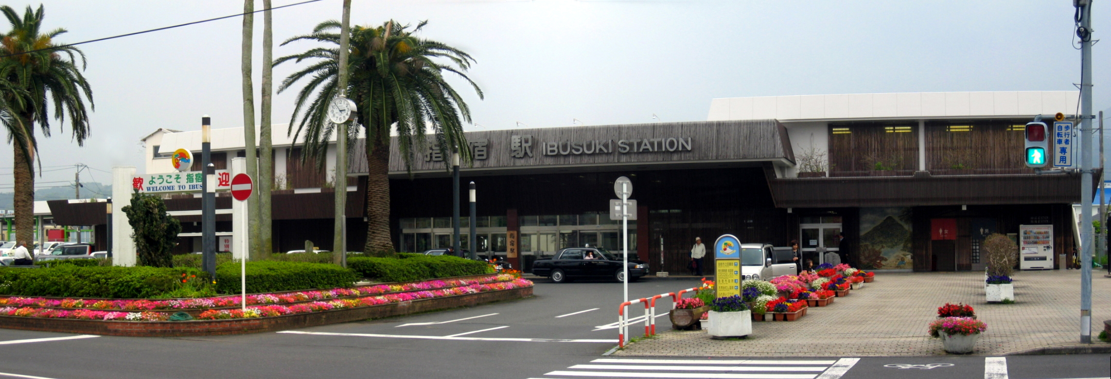 指宿駅前 Ibusuki Station